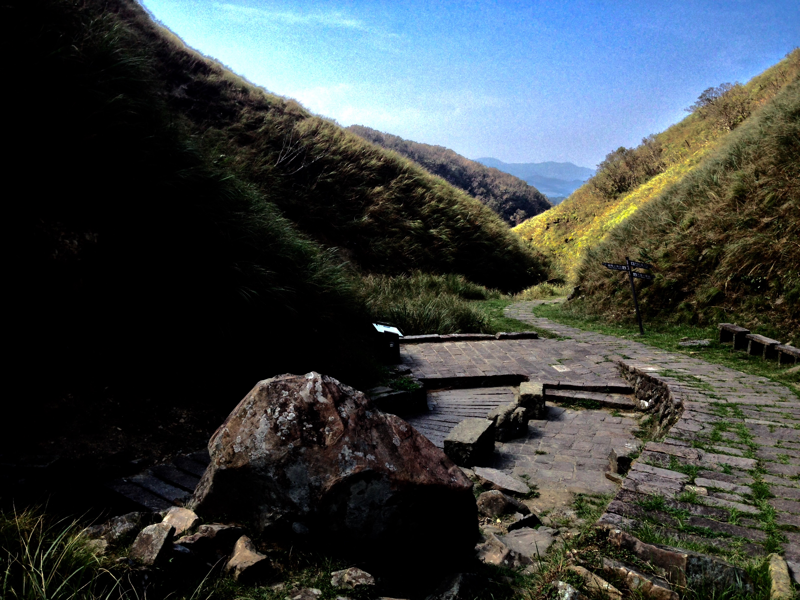 草嶺古道埡口與虎字碑背側